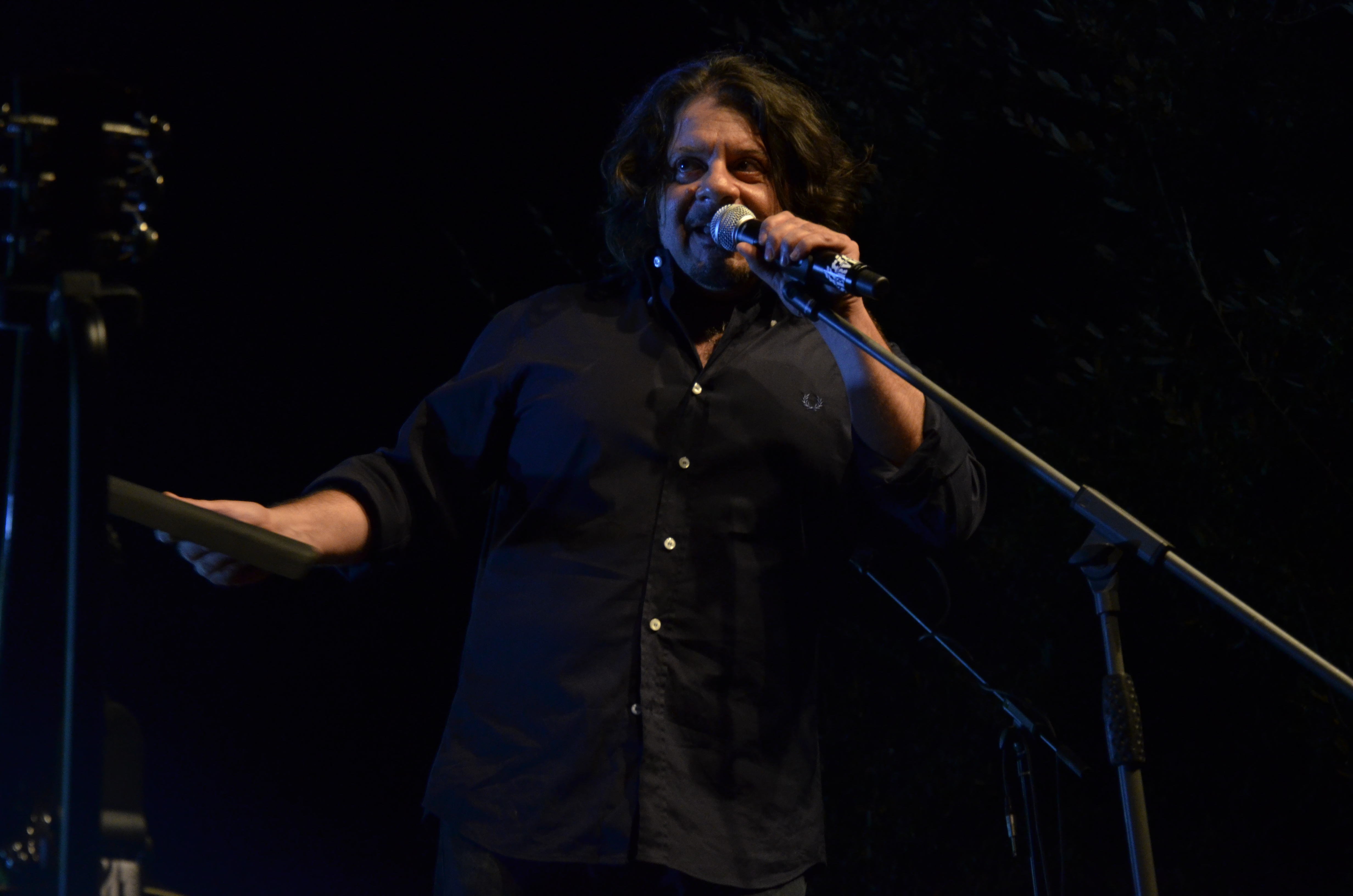 Lillo